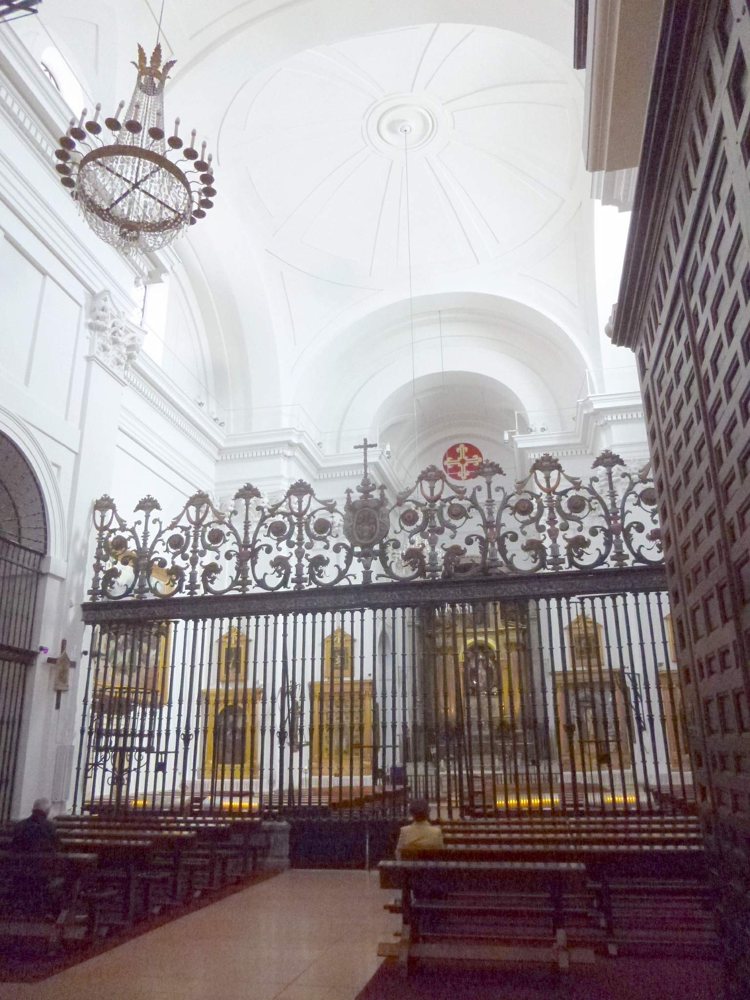 Santuario de Nuestra Señora de la Caridad (Illescas, Toledo)